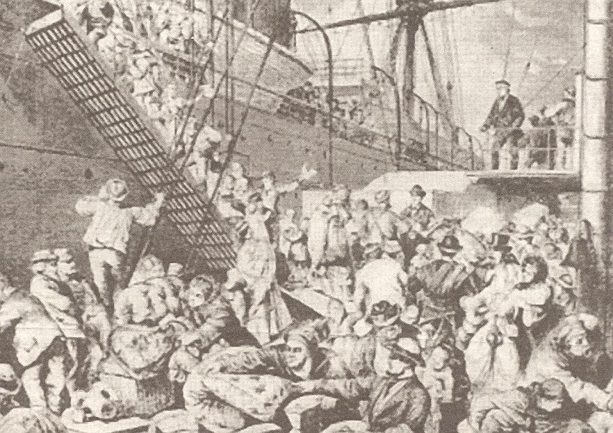 Avskedsstund vid Packhuskajen i Göteborg under andra hälften av 1800-talet, en samtida tidningsbild.